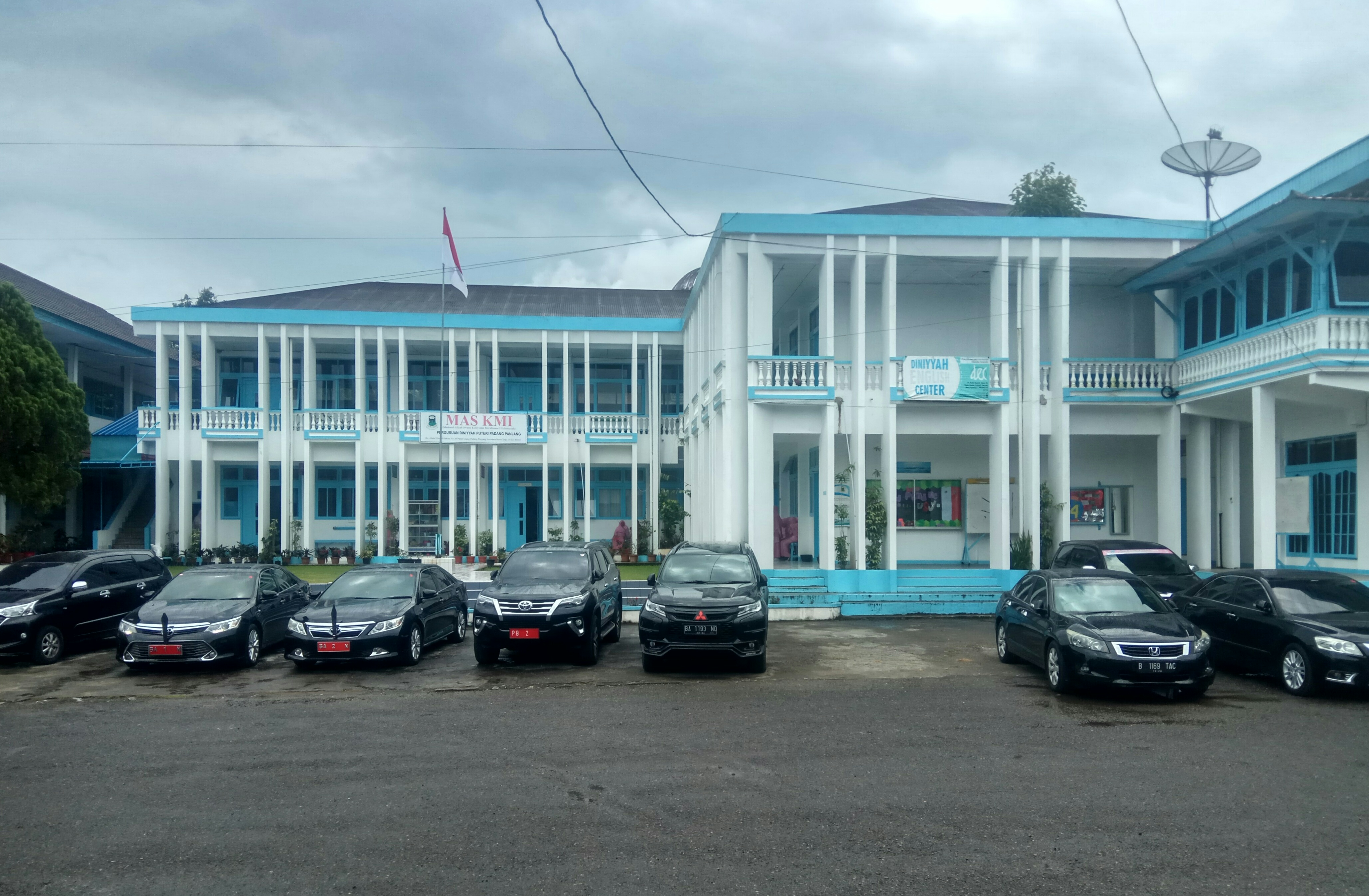 Diniyah Putri 2019